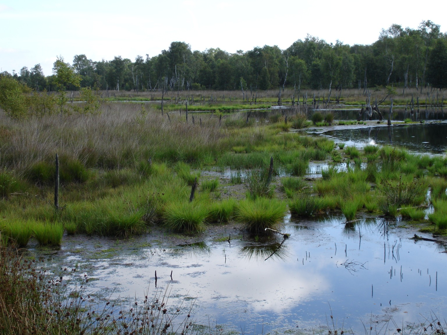 Wittmoor